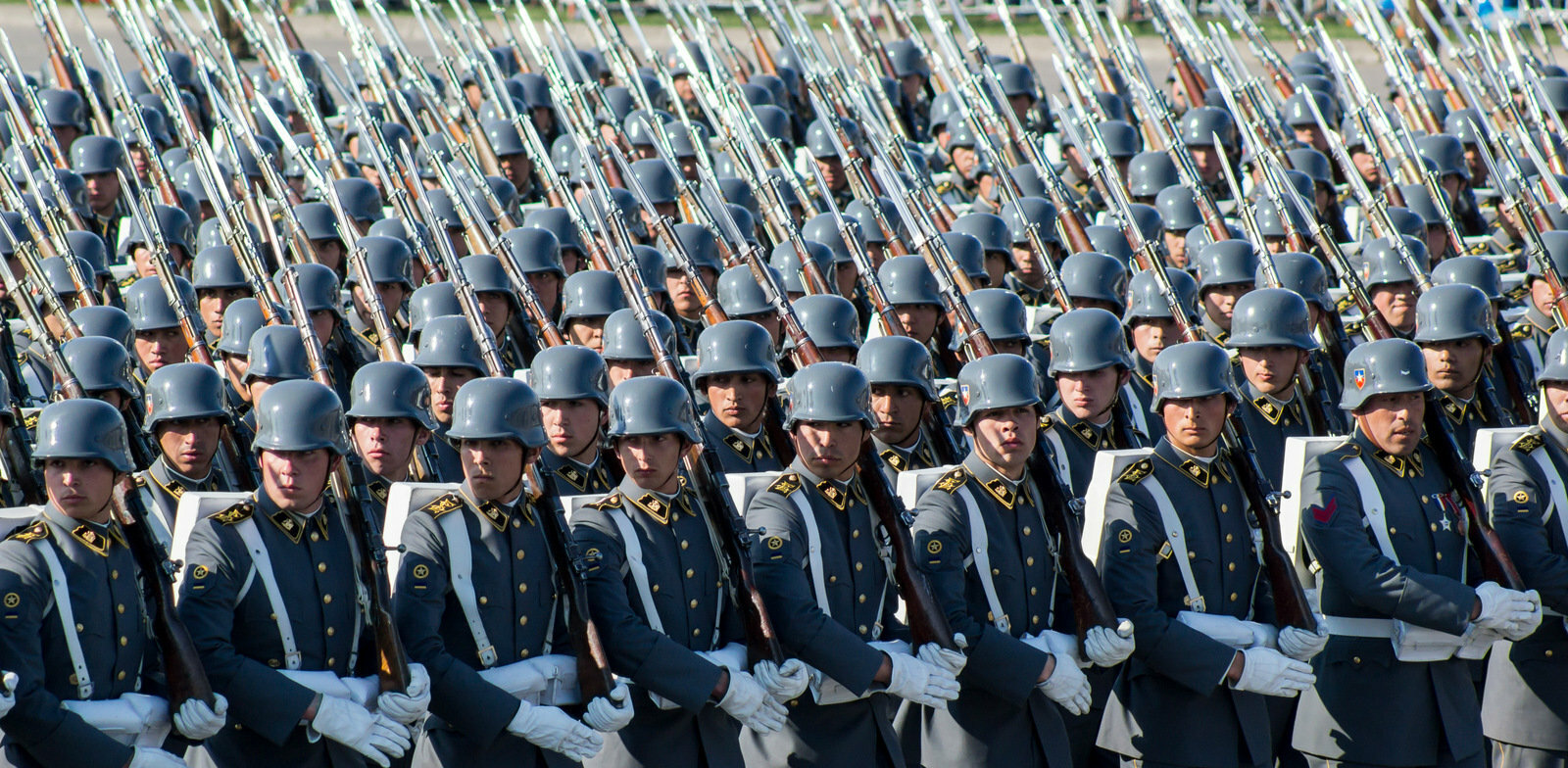 Durante la Parada Militar del 19 de septiembre de 2014, desfilan los efectivos de la Escuela de Suboficiales del Ejército de Chile.